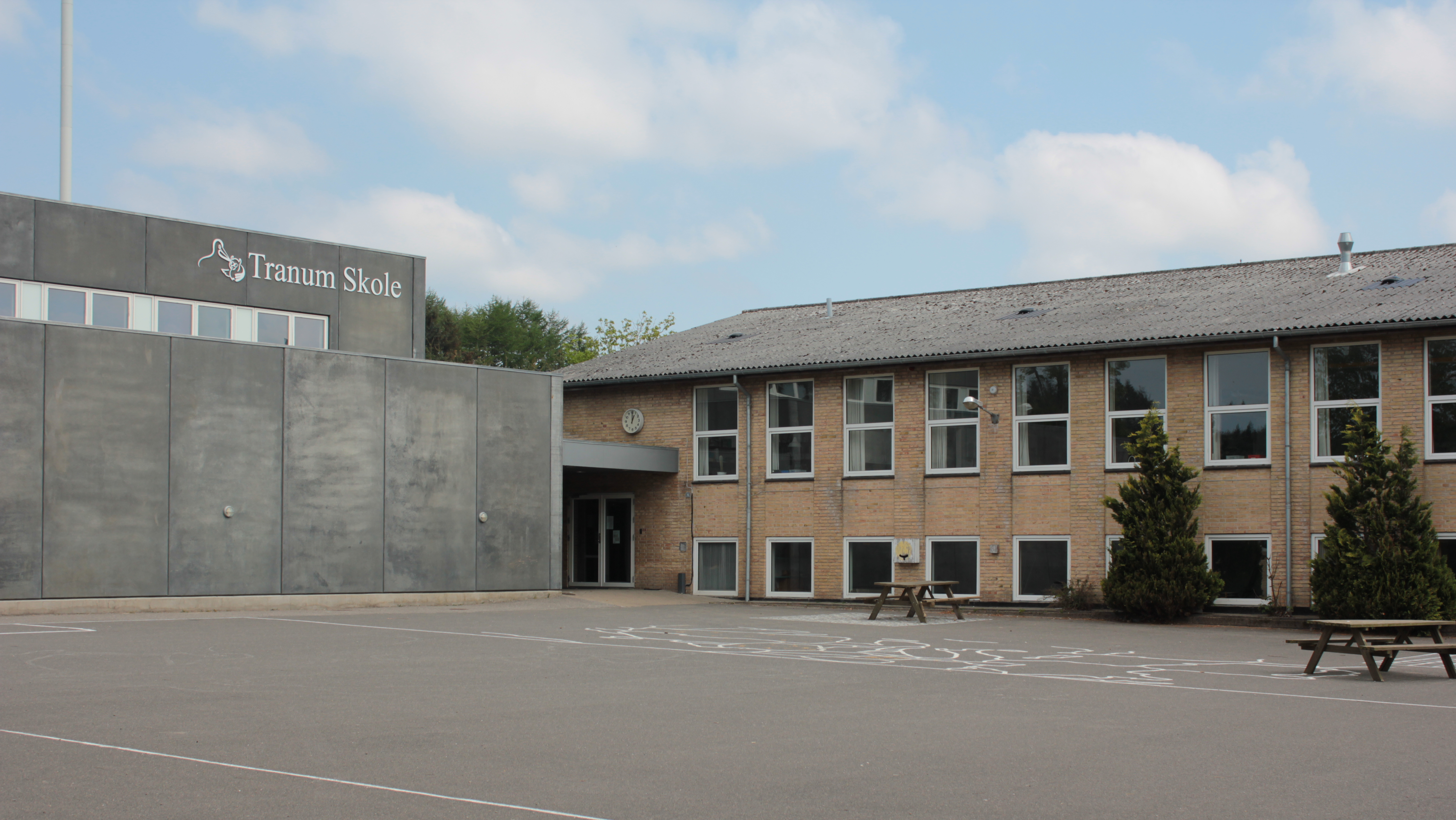 Tranum Skole